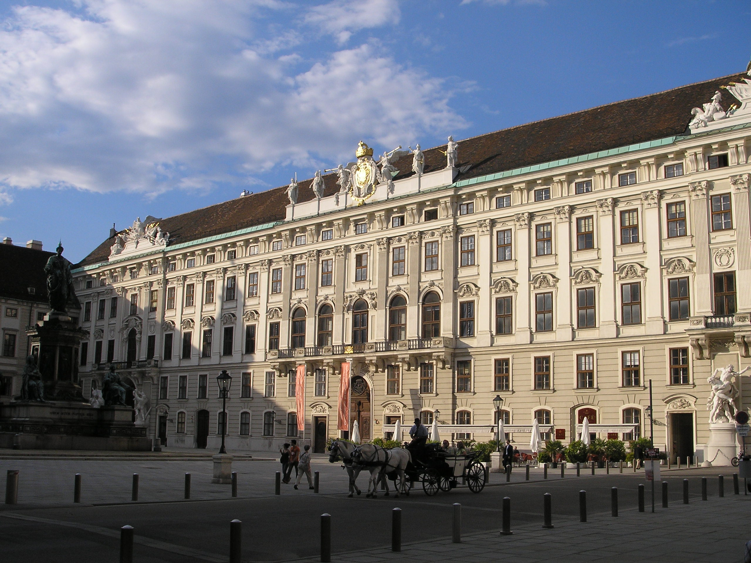 The Reichskanzleitrakt of the Hofburg Imperial Palace in Vienna.